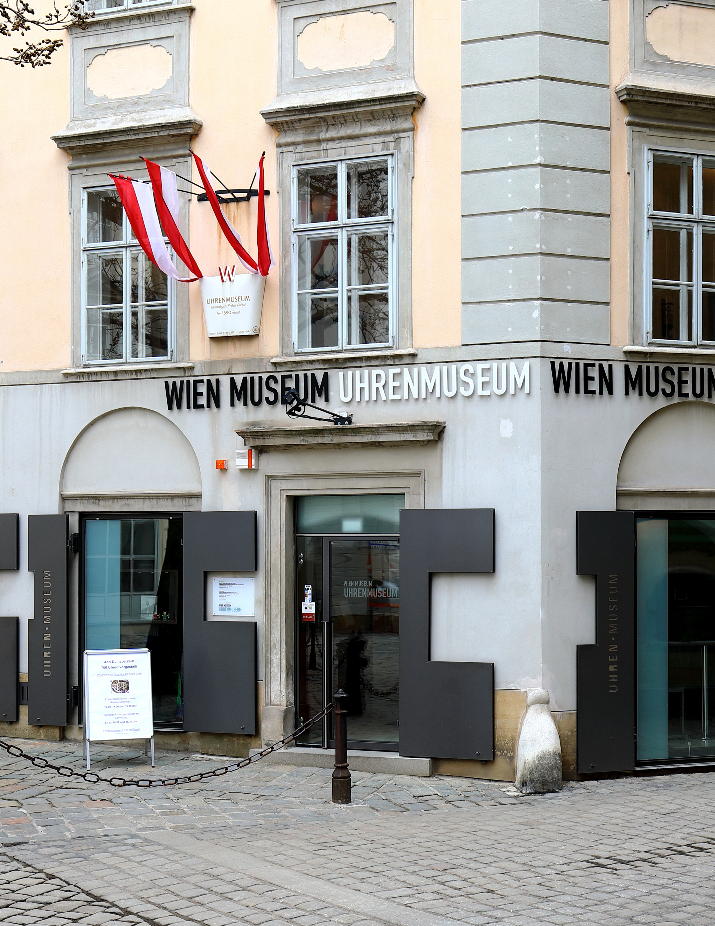 Portal des Uhrenmuseums im 1. Wiener Gemeindebezirk Innere Stadt an der Adresse Schulhof 2. In einem der ältesten Häuser Wiens, dem Palais Obizzi, werden auf 3 Etagen rund 700 Uhren präsentiert. Das Museum wurde 1917 gegründet und geht im Wesentlichen auf die private Sammlung des Mittelschullehrers Rudolf Kaftan und auf die wertvolle Taschenuhrensammlung der Schriftstellerin Marie von Ebner-Eschenbach († 1916) zurück.